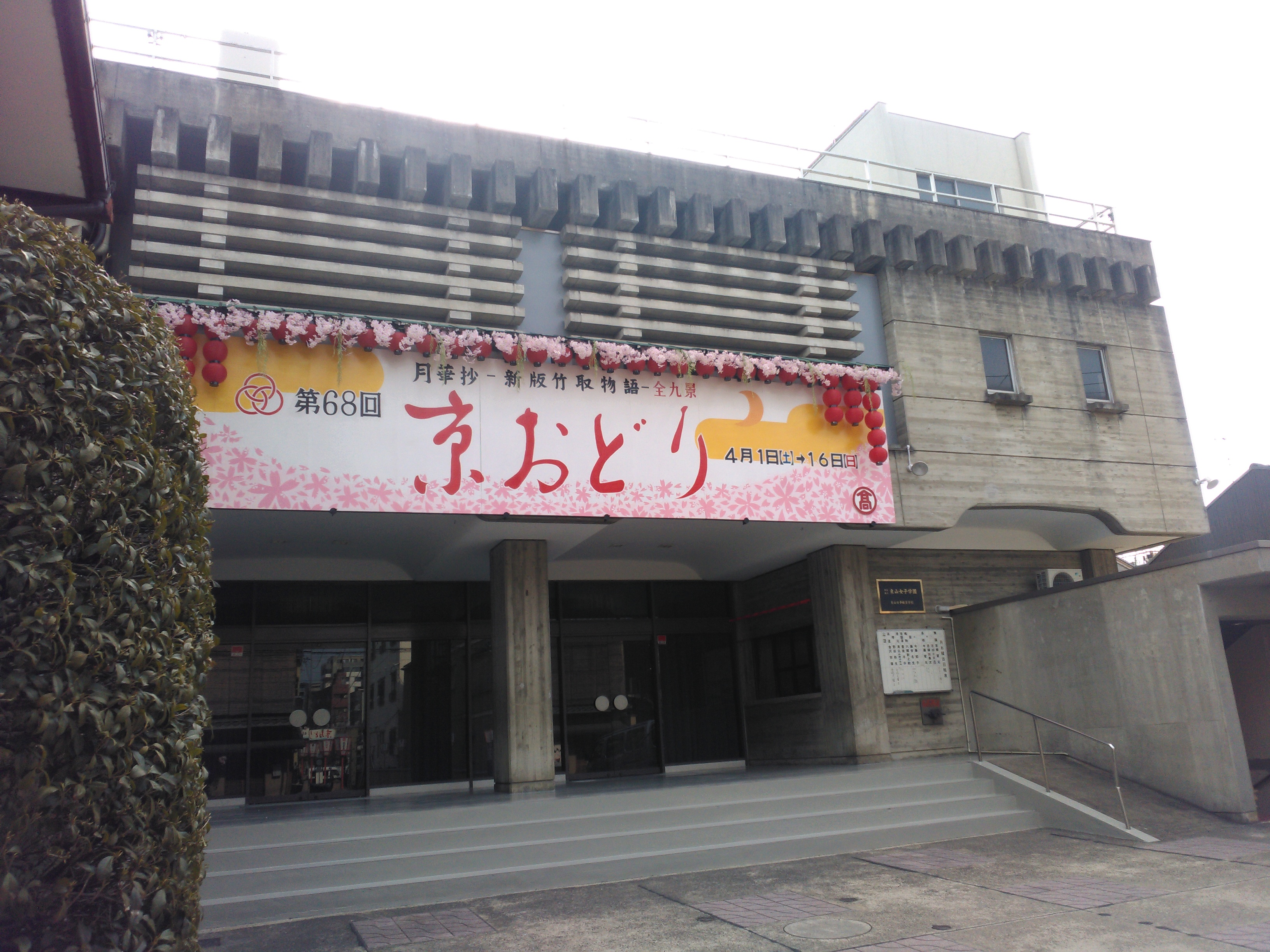 東山女子学園